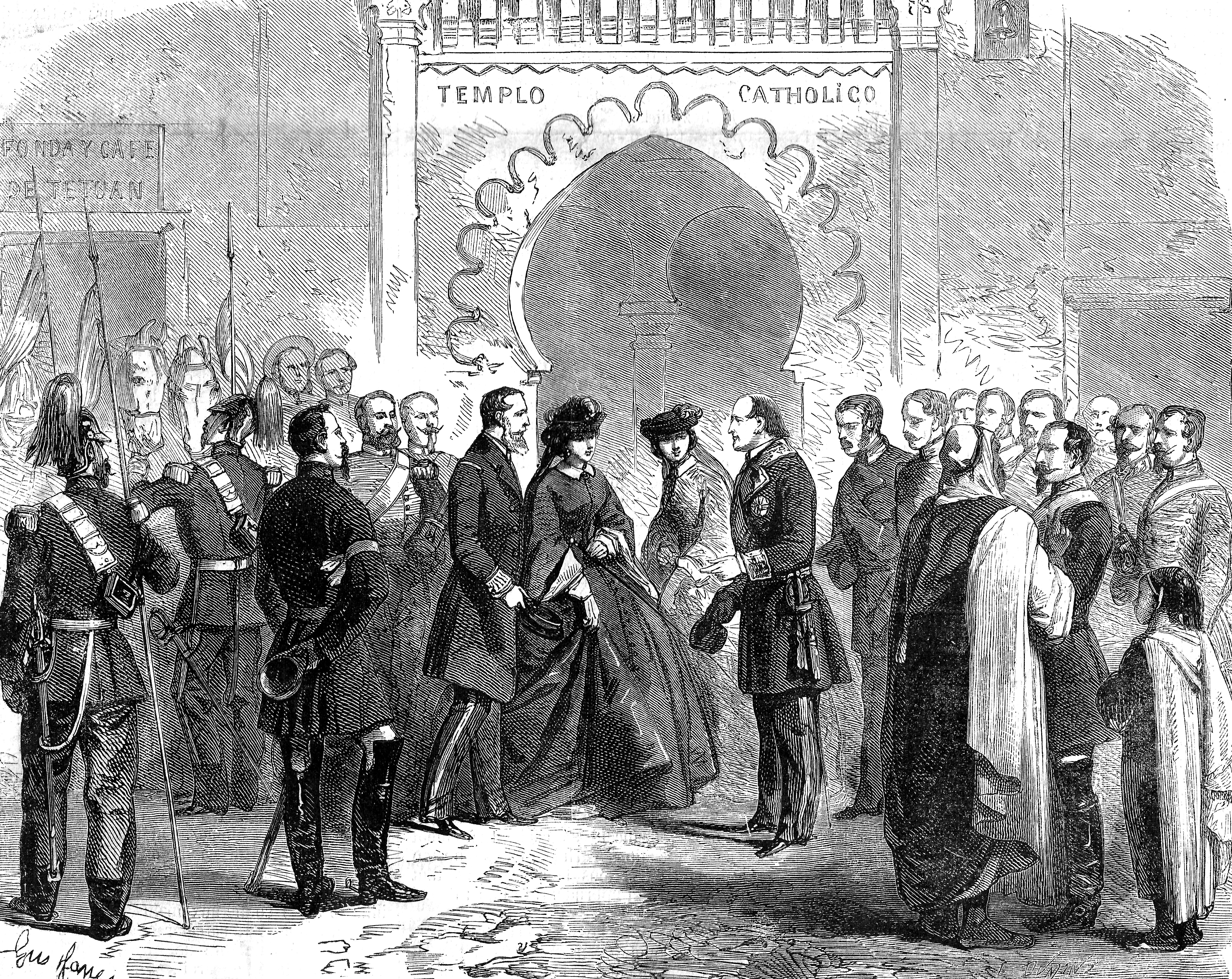 Visite des archiducs Maximilien et Charlotte à Tétouan (Maroc), mars 1860. — On aperçoit Charlotte et Maximilien, en uniforme d’amiral, à la sortie de l’église, où les attend le maréchal O’Donnell, chef de l’armée espagnole, et son état-major.